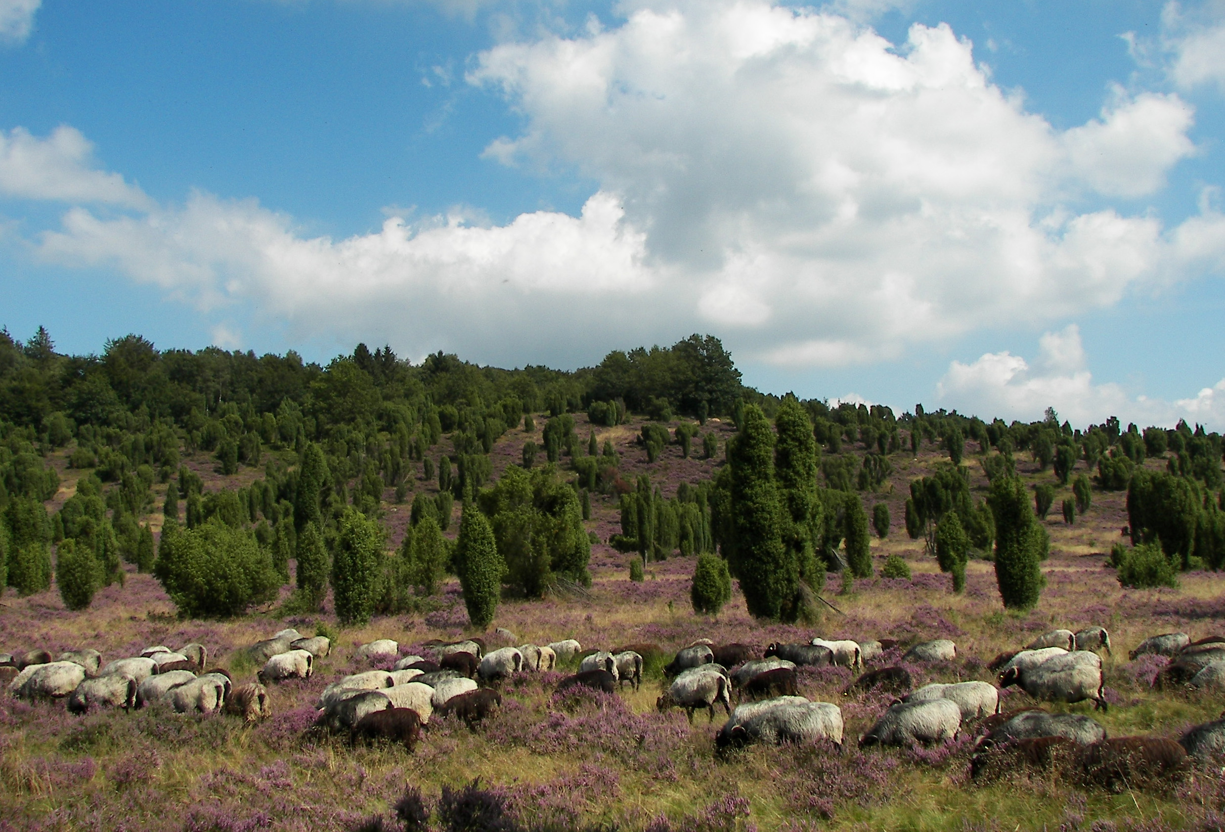 Heidschnucken im Steingrund, Lüneburger Heide